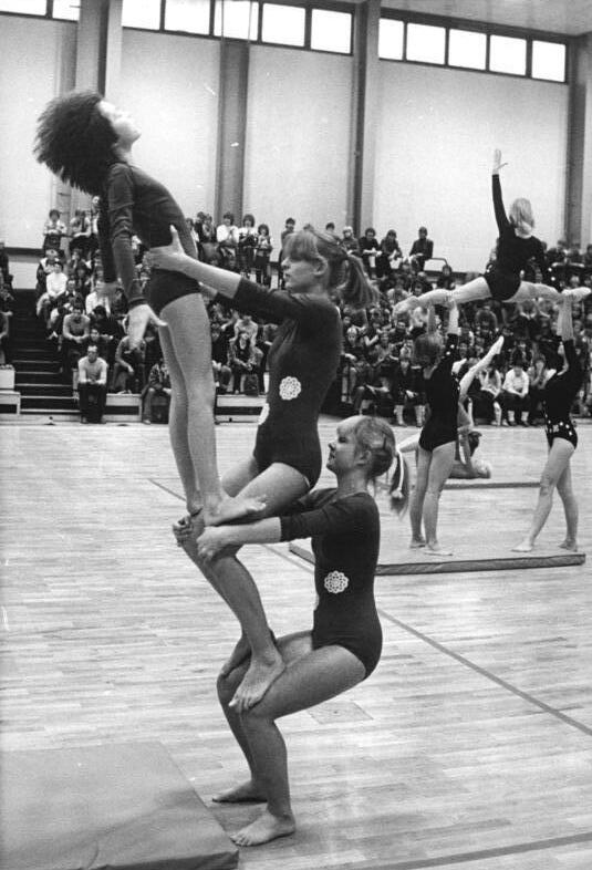 Chemnitz, Akrobatikvorführung ADN-ZB Thieme 11.1.84 Karl-Marx-Stadt: Eine neue Sporthalle mit einer Spielfläche von 30 x 48 Metern und transportablen Traversen für 600 Zuschauer wurde am Schloßteichgelände der Stadt übergeben. Vormittags nutzen vor allem die Lehrlinge die Halle für ihren Sportunterricht. Anschließend findet der allgemeine Übungs- und Wettkampfbetrieb verschiedener Sektionen, zu denen u.a. die Sportakrobatikgruppe gehört (siehe Foto), statt. (siehe 24 N) Die moderne Sportstätte ist auch zur Austragung nationaler und internationaler Wettkämpfe geeignet.